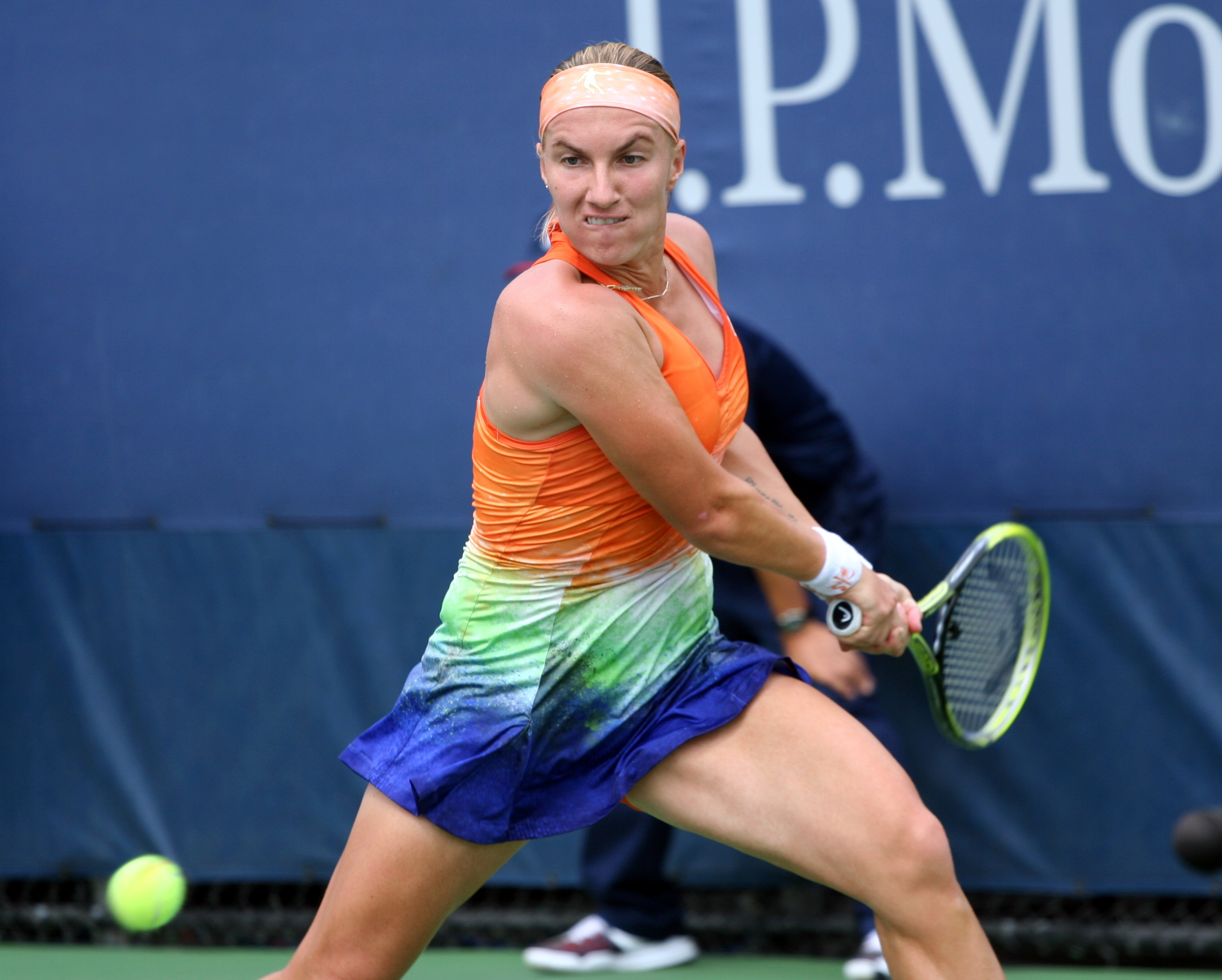 Svetlana Kuznetsova - Saturday, August 31, 2013